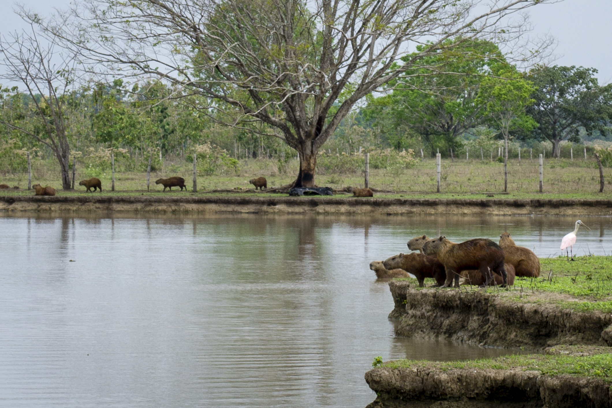 Barinas, Venezuela